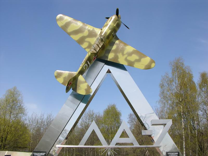 City Khimki (г.Химки)